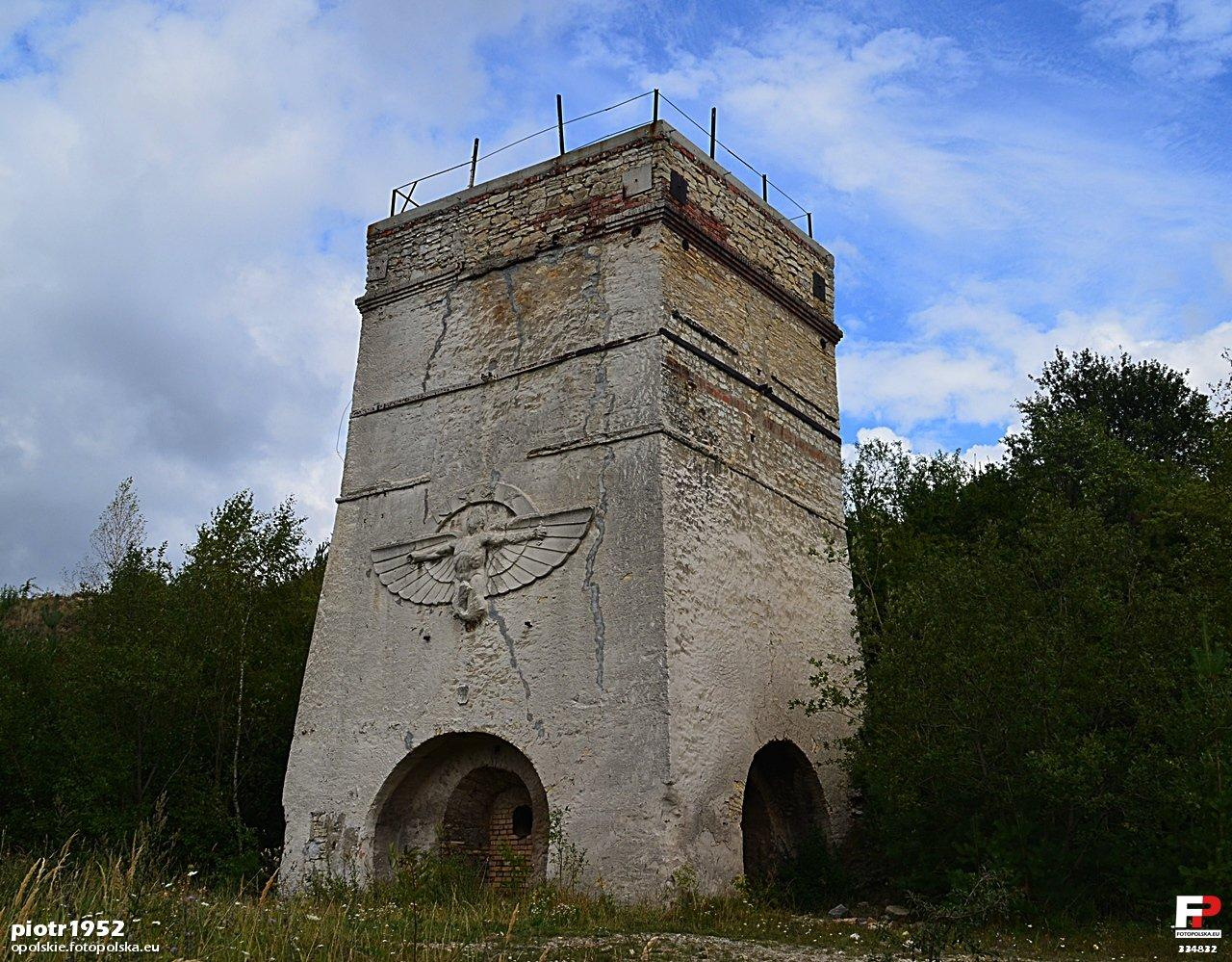 Piec wapienniczy . Widok na palenisko ( lewa strona ) z drugiej strony tego paleniska jest drugie paleniska a widoczny otwór z przodu pieca to nawiew. Prawdopodobnie ostatnie wypalanie skały wapiennej zakończono z końcem lat 60 - tych